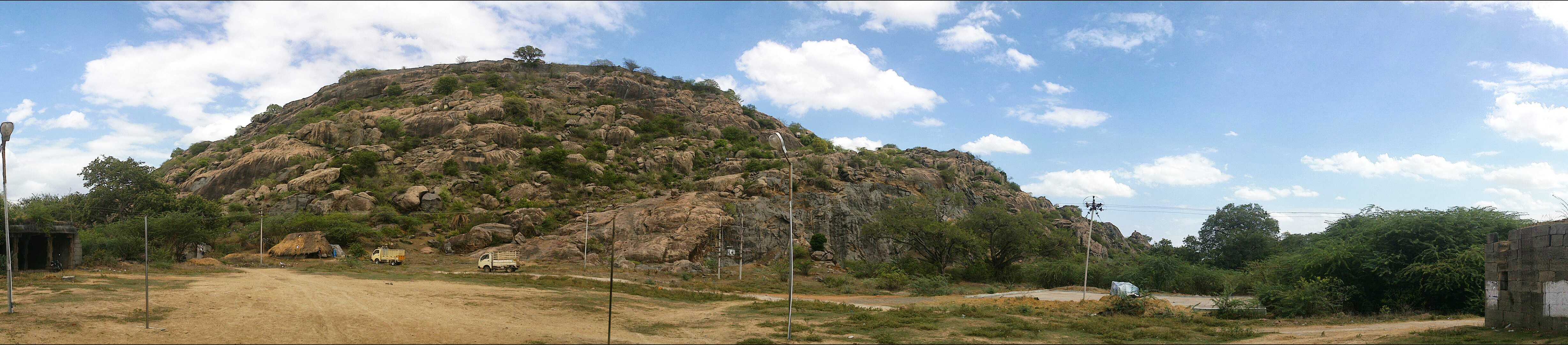 பெருமுக்கல் மலையின் தோற்றம்